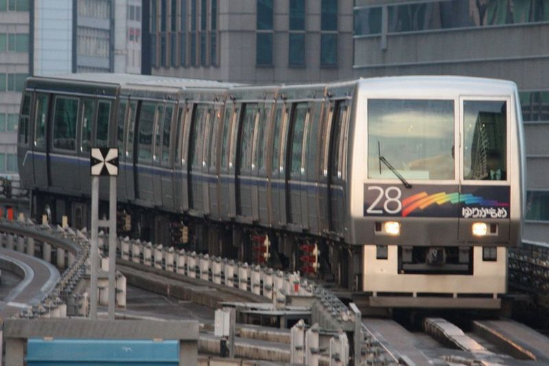 東京臨海新交通（ゆりかもめ）7200系6次車 汐留にて